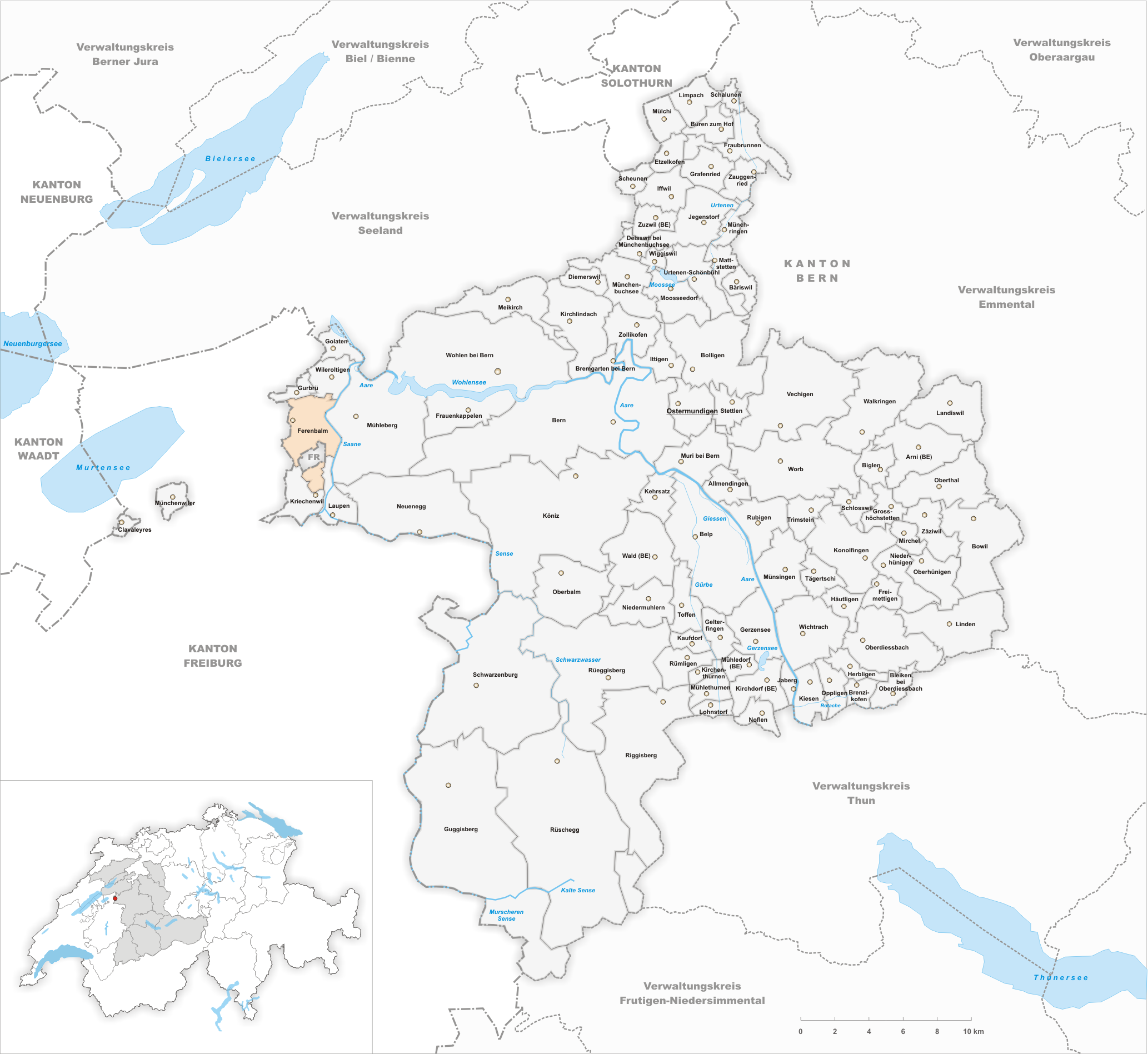 Municipality Ferenbalm